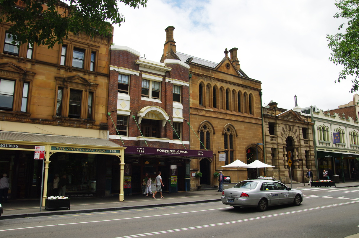 Fortune of War, ältester Pub Sydneys